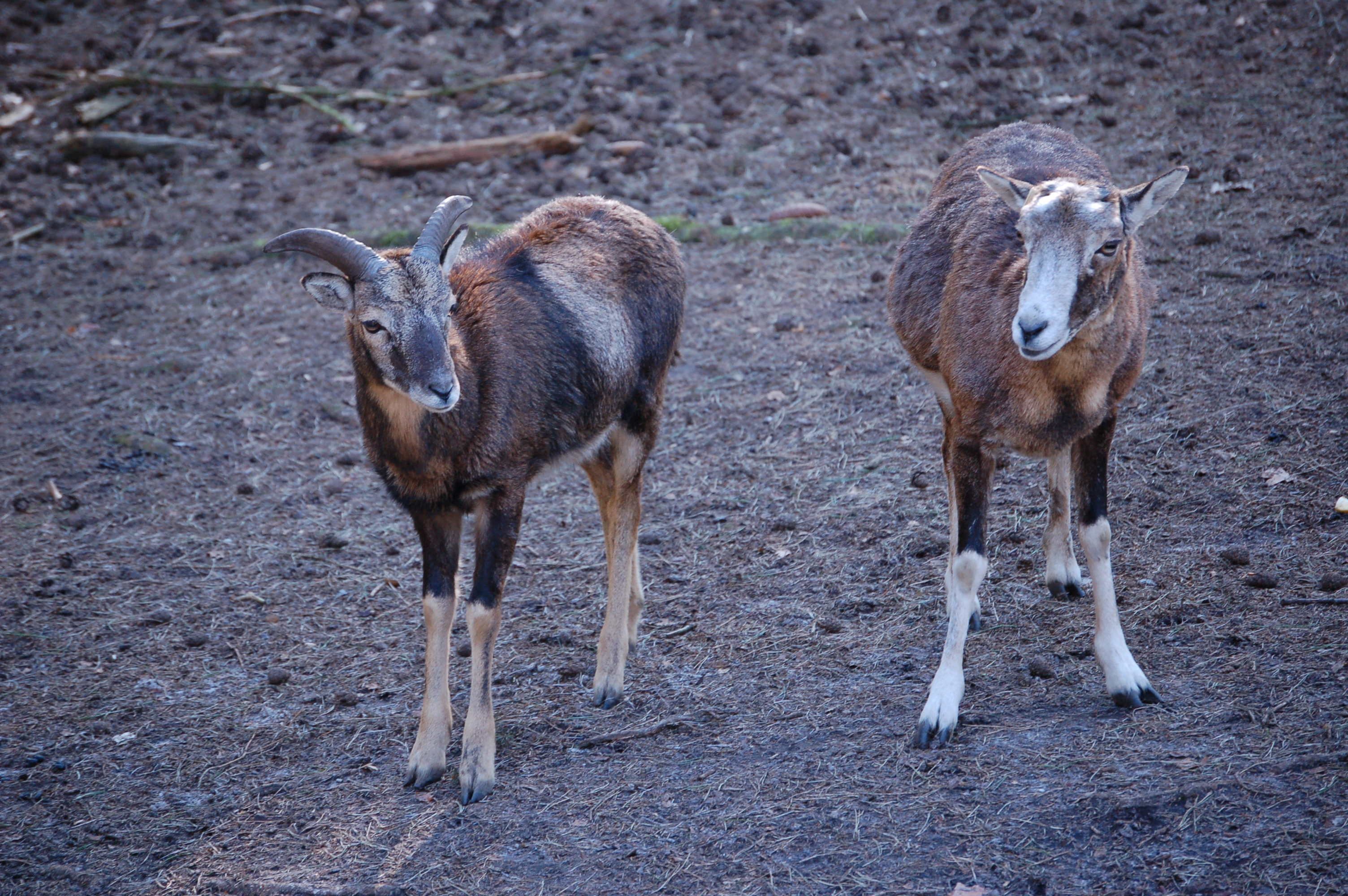 Mufflons im Wildgehege Klövensteen (Hamburg)